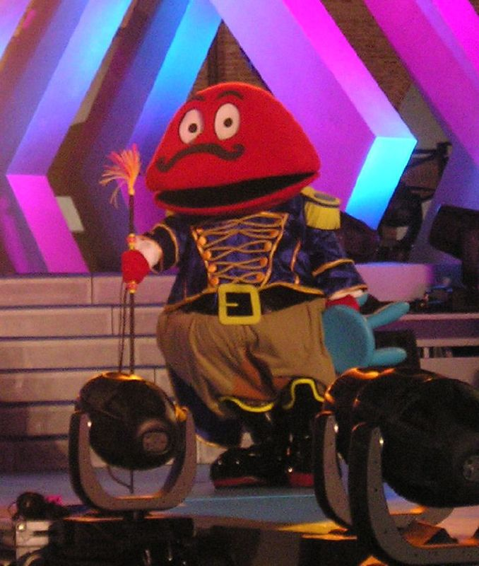 Il Gabibbo a Senigallia scaricata da flickr